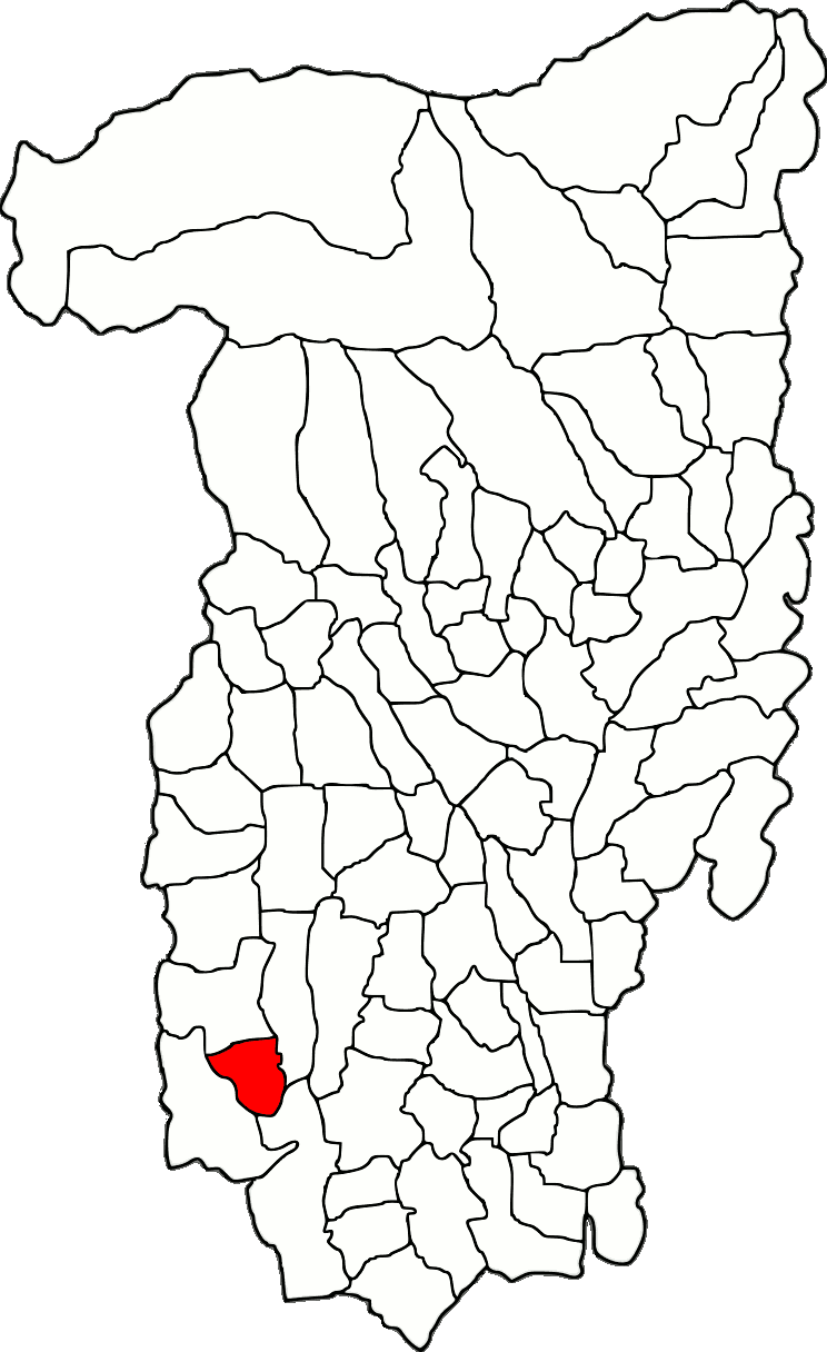 Lage der Gemeinde Lăcusteni im Kreis Vâlcea (RO).